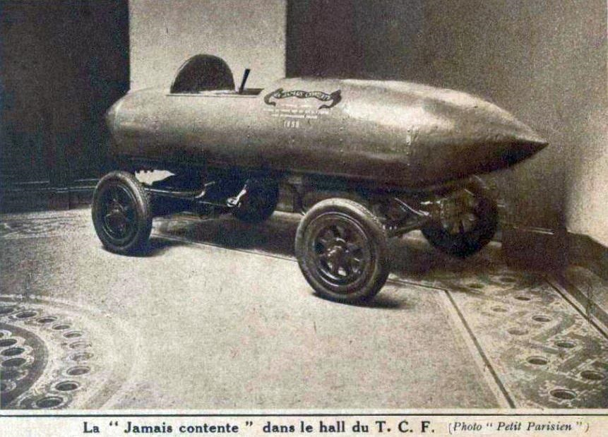 La Jamais-Contente dans le hall du Touring Club de France en 1932